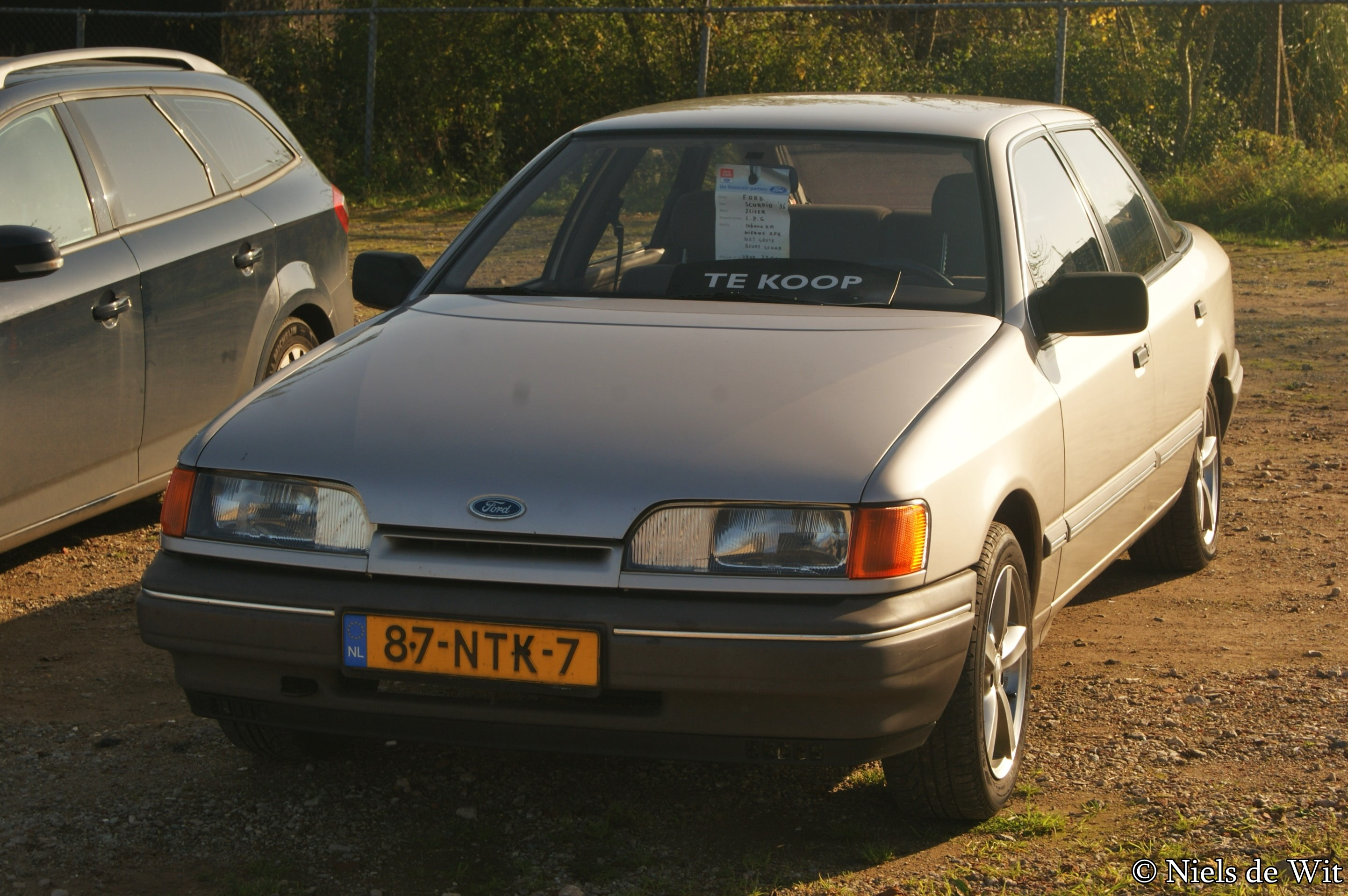 87-NTK-7 Ford Onderdelendag, Barneveld